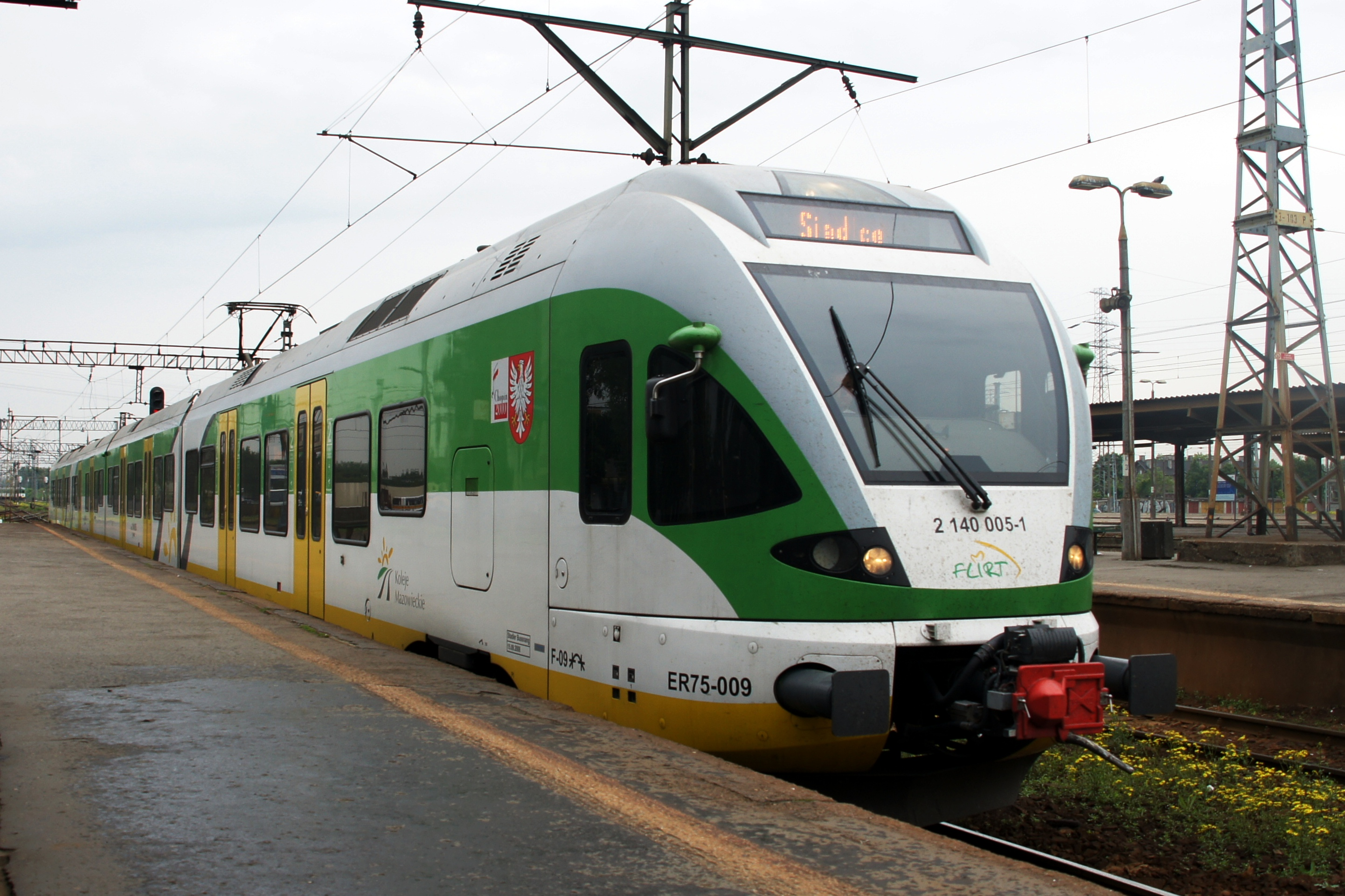 Stadler FLIRT - Koleje Mazowieckie wjeżdża na stacje Warszawa Zachodnia